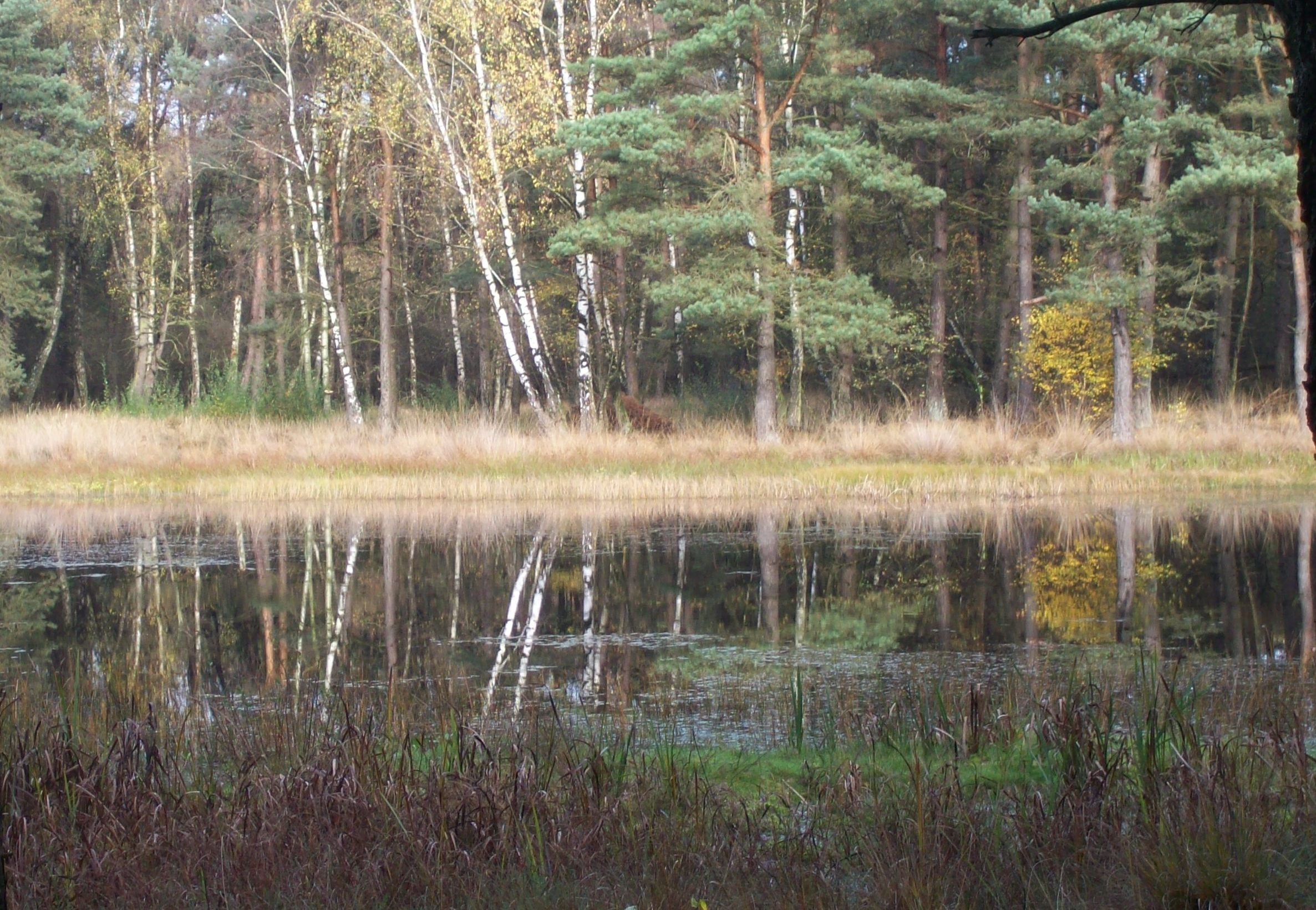 Naturschutzgebiet „Swatte Poele“ (NSG WE 051) in Bippen, Niedersachsen